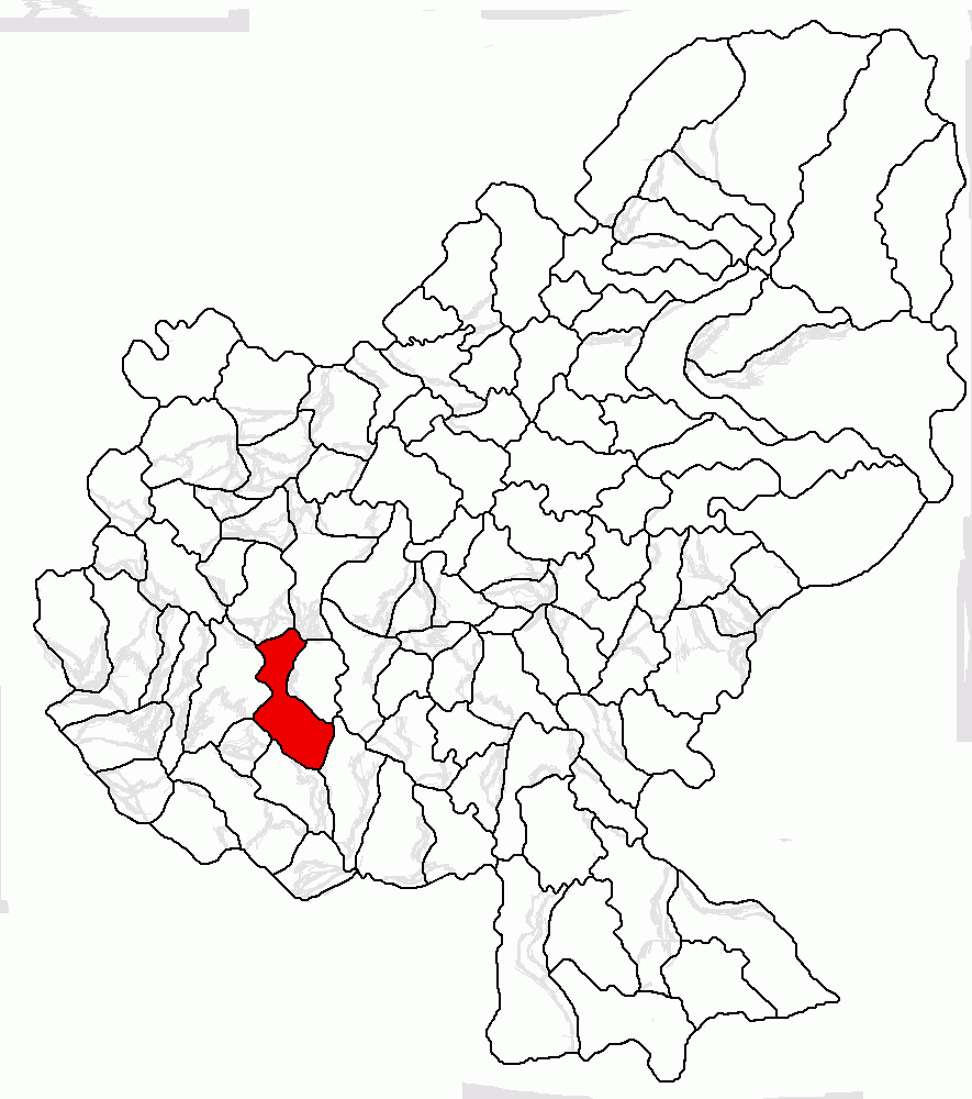 Categorie:Hărţi ale judeţului Mureş